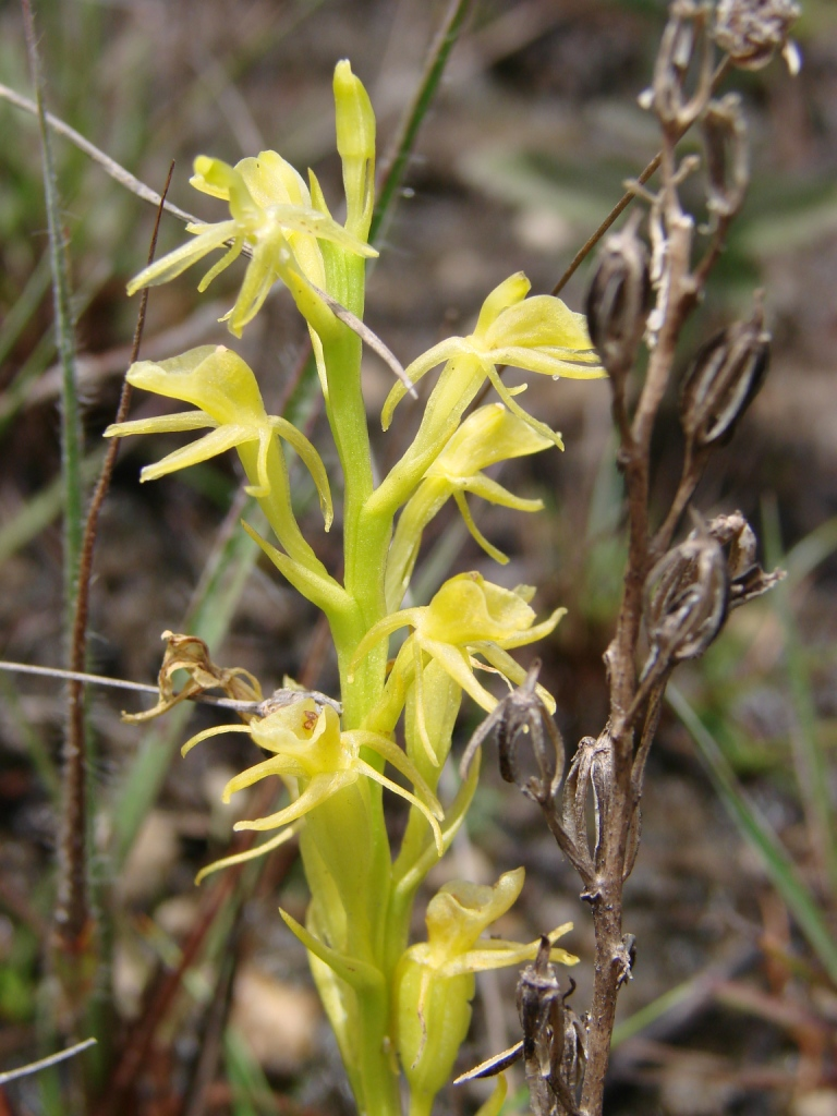 Habenaria brevidens Lindl. - ORCHIDACEAE - Parque Estadual da Serra dos Pirineus - Pirenopolis - Goias - Brasil.